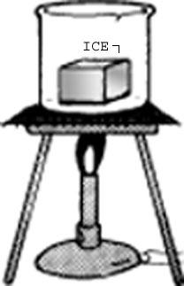 പകർപ്പവകാശ വിവരങ്ങൾ